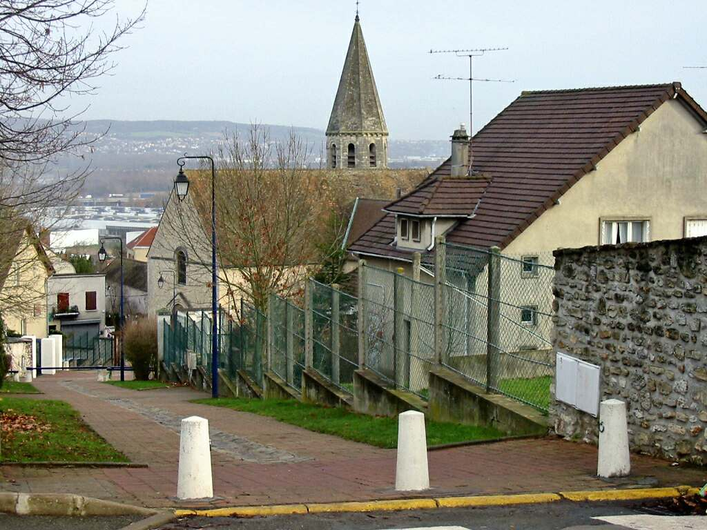 Épône, rue du Pavé Photo JH Mora, janvier 2005